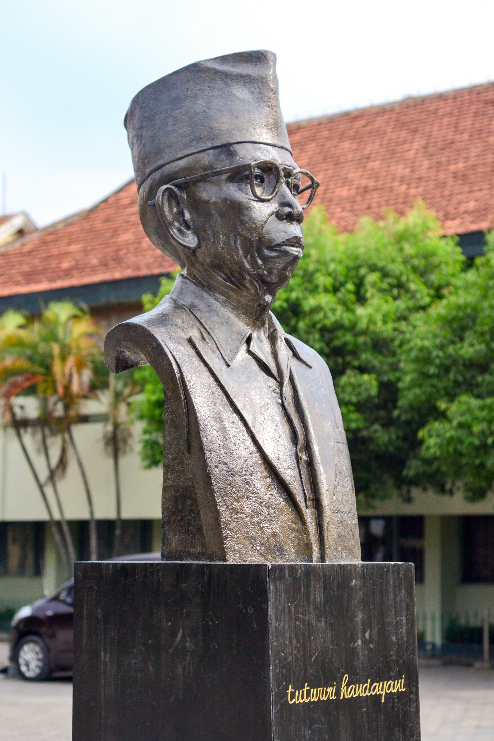 Patung Ki Hadjar Dewantara, terletak di depan kompleks Sekolah Tamansiswa Yogyakarta